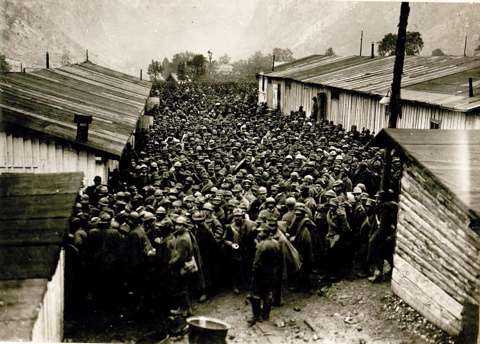 Italijanski vojni ujetniki po bitki pri Kobaridu